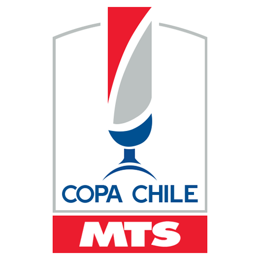 Logo Copa Chile MTS.